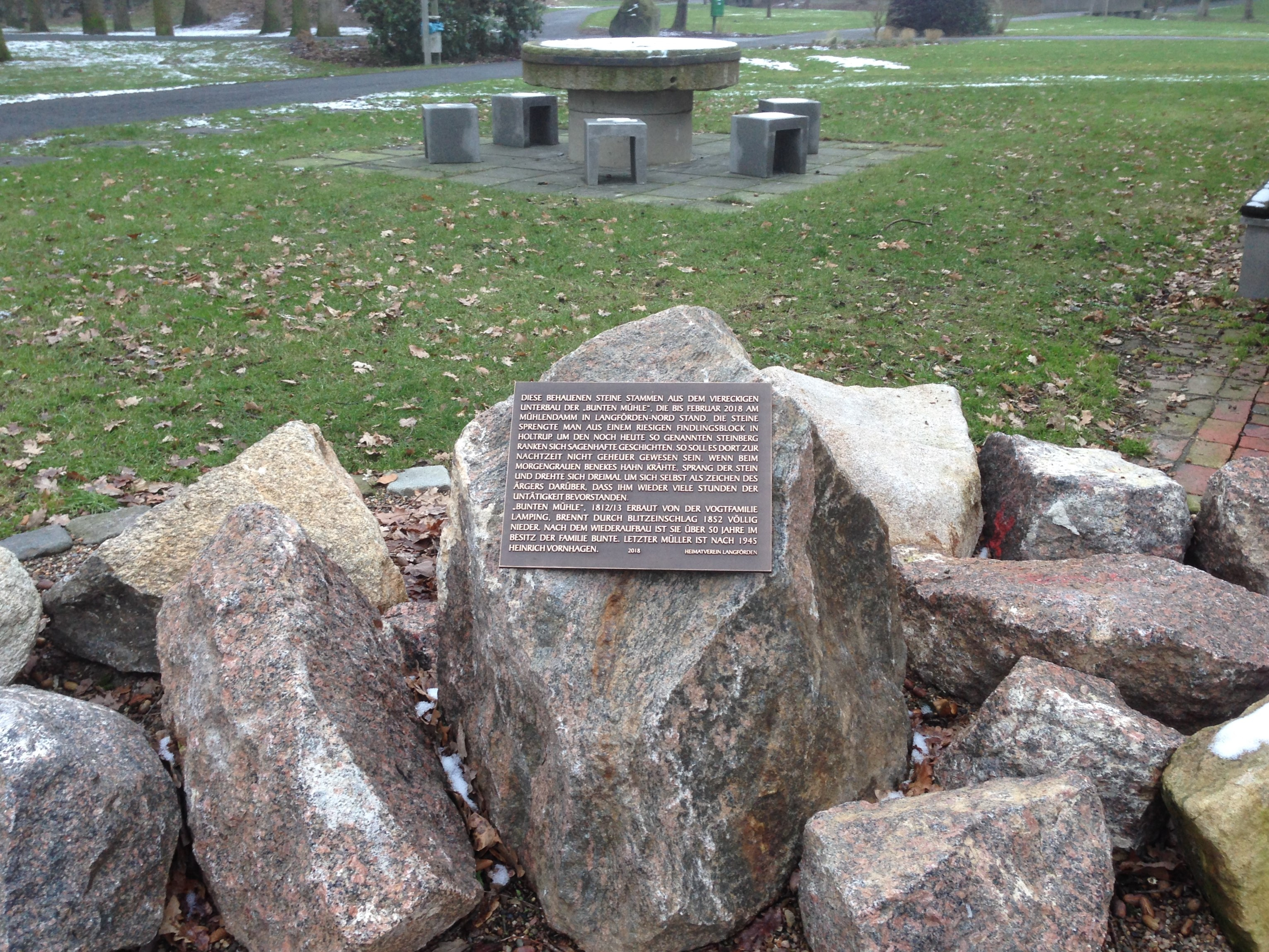 Die Bunten Mühle, ein Galerieholländer, stand bis 2018 am Mühlendamm in Langförden. Sie sollte nach dem vollständigen Abriss in den Niederlanden wieder aufgebaut werden. Tatsächlich befinden sich der Mühlstein (Hintergrund) und Steine aus dem Fundament der Mühle im Dorfpark Langförden. Die Mühle bildete früher Station 18 der Niedersächsischen Mühlenstraße (Region Oldenburger Münsterland und Wildeshauser Geest). Die Aufnahme in die Mühlenstraße konnte die Mühle nicht vor dem auf dem Foto sichtbaren "Schicksal" bewahren.